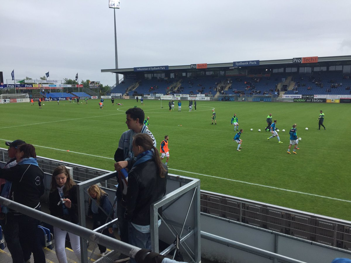 SønderjyskE's stemningstribune, Blue Section, før hjemmekampen imod AGF den 17. juli 2016